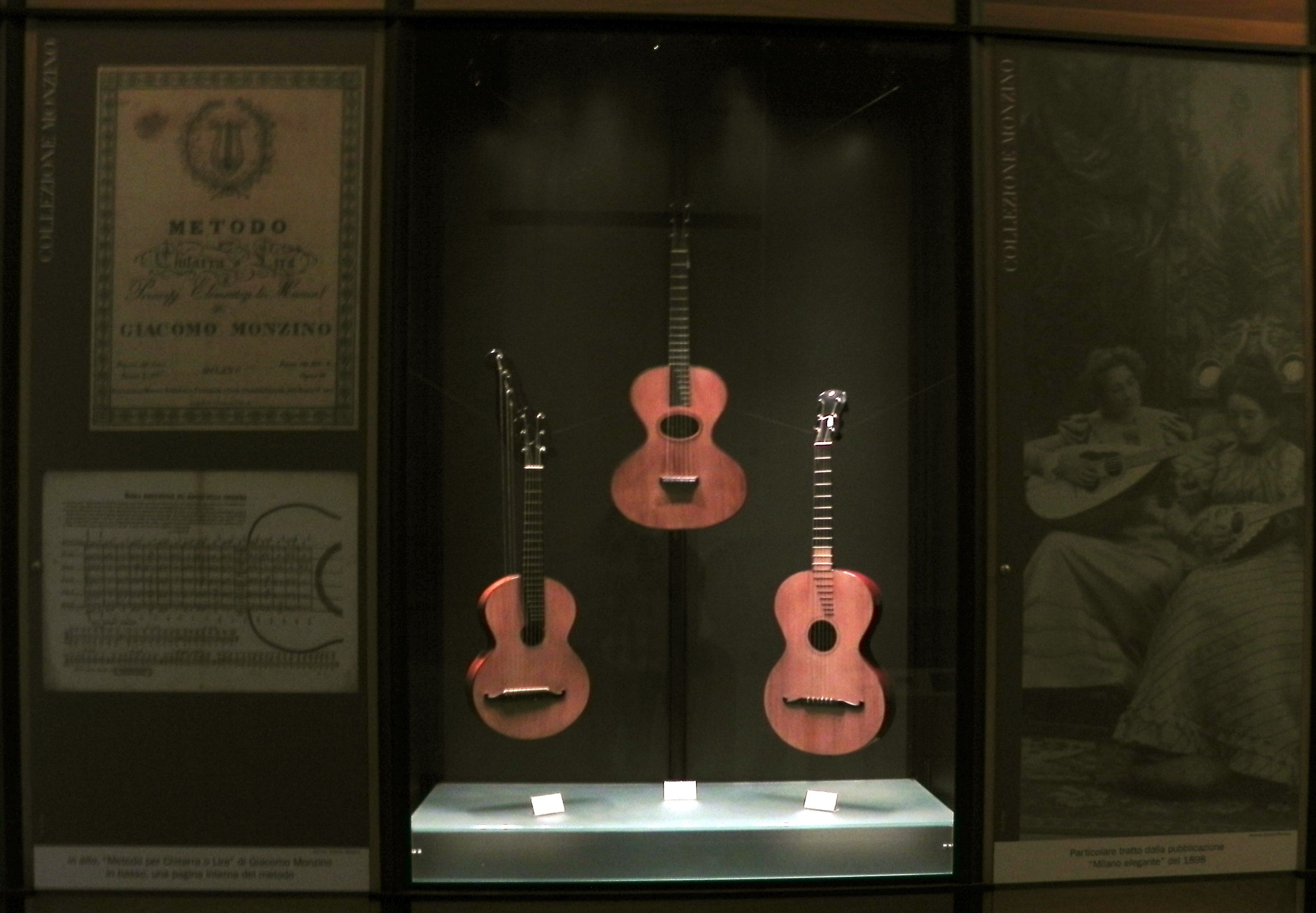 Collezione Monzino - chitarre quote from Musei del Castello Sforzesco#Chitarre: “Chitarre Spicca tra le altre la chitarra battente di Mango Longo del Seicento, che colpisce per la raffinatezza dei dettagli e la cura nella realizzazione. Molti dettagli non sono originali e, come molti strumenti antichi, venne modificata da chitarra battente a chitarra barocca per soddisfare le mutevoli necessità del tempo e dei musicisti.”